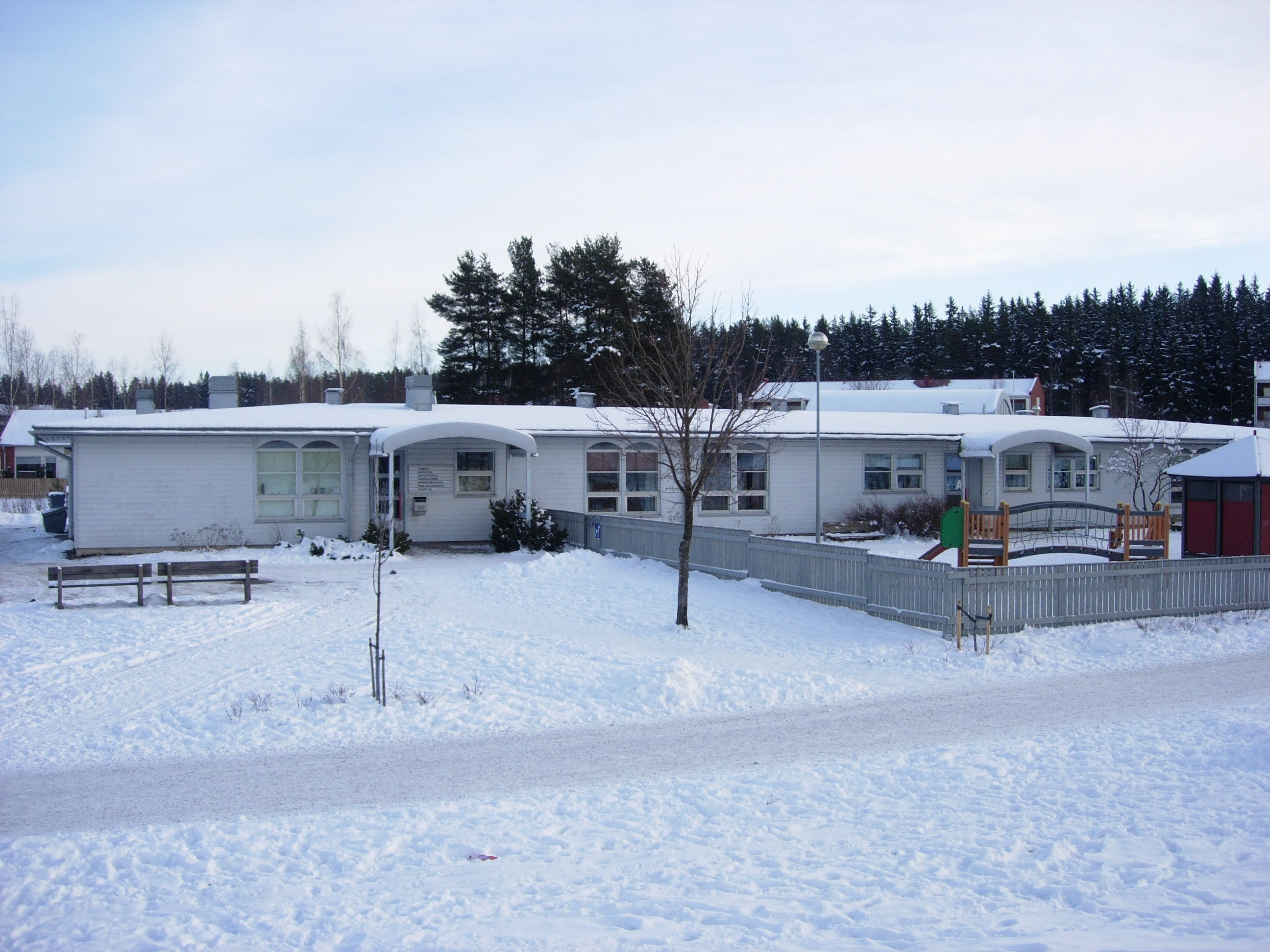 Halisten päiväkoti, Turku.